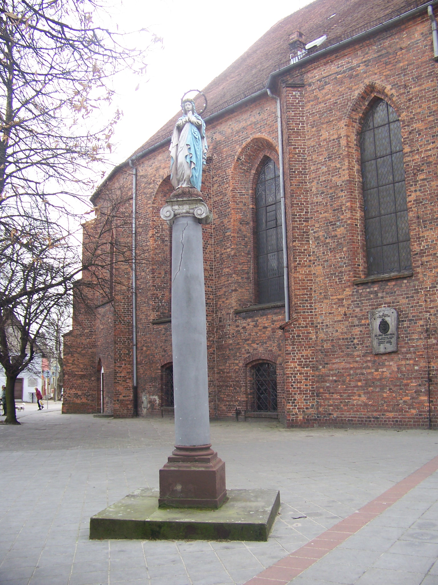 Figura Marii przed kościołem Wniebowzięcia NMP